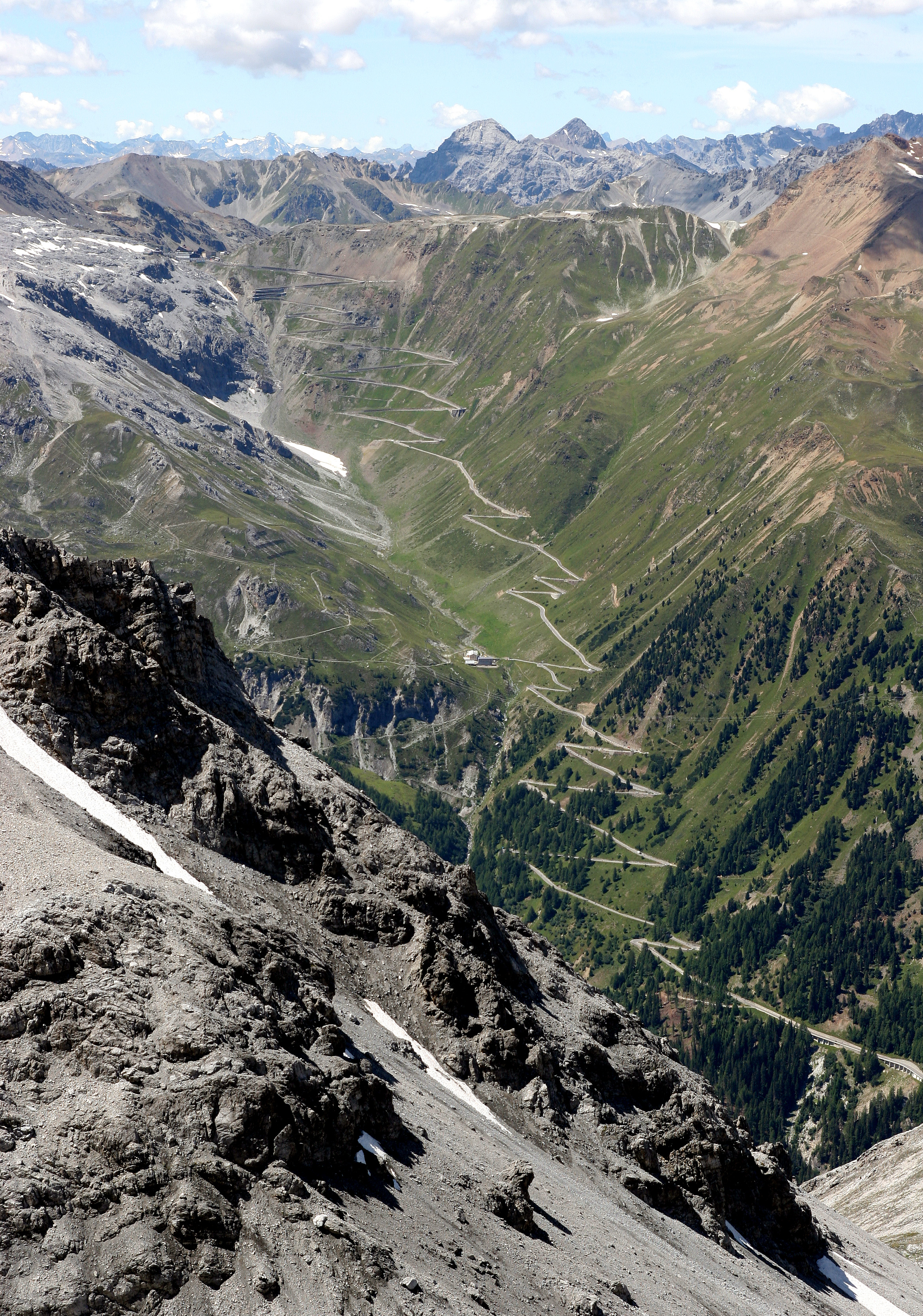 Die Ostrampe des Stilfser Jochs. Fotografiert von der Payerhütte (3029 m ü. NN). In der Bildmitte die Franzenshöhe.